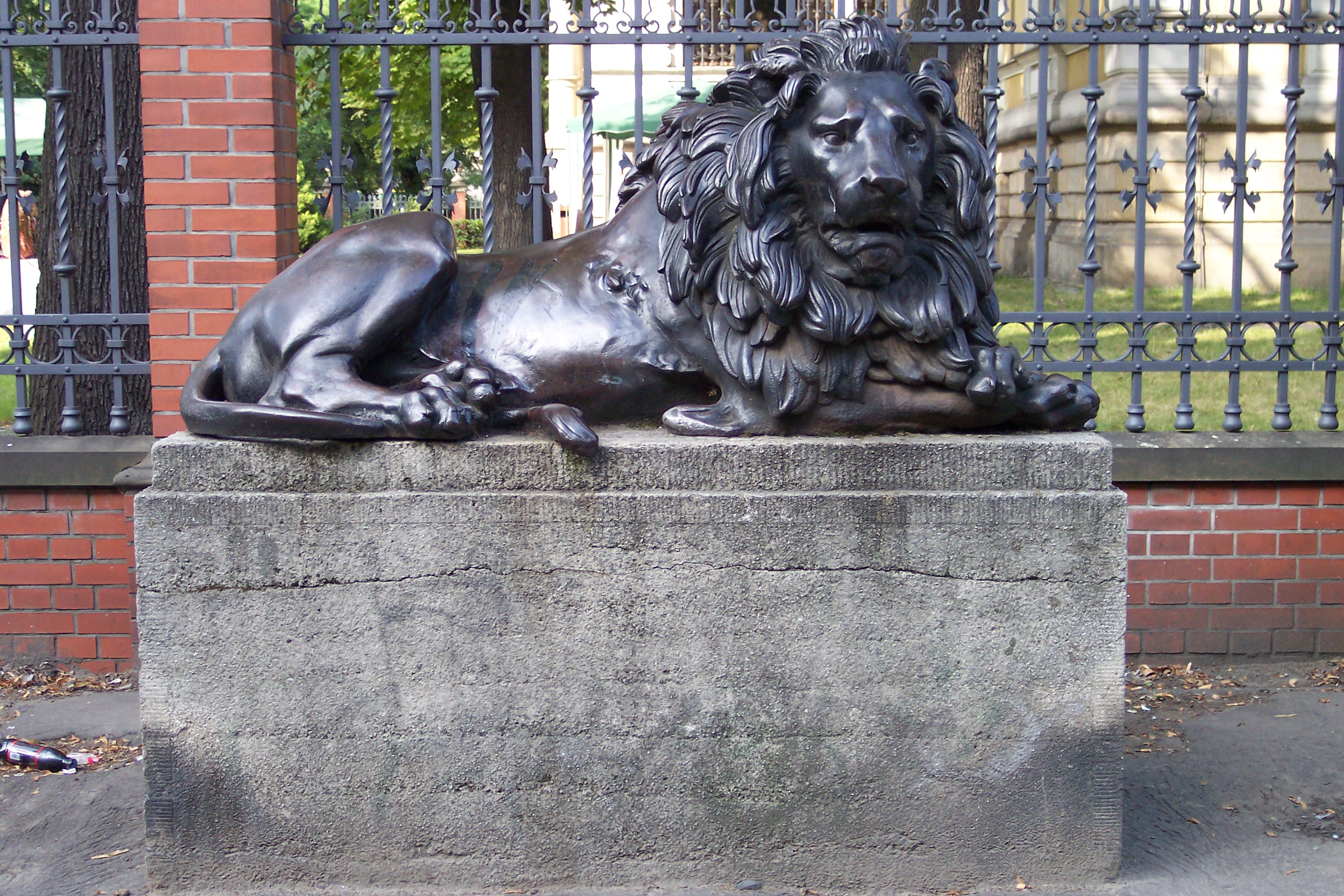 Lew przed Willą Caro w Gliwicach